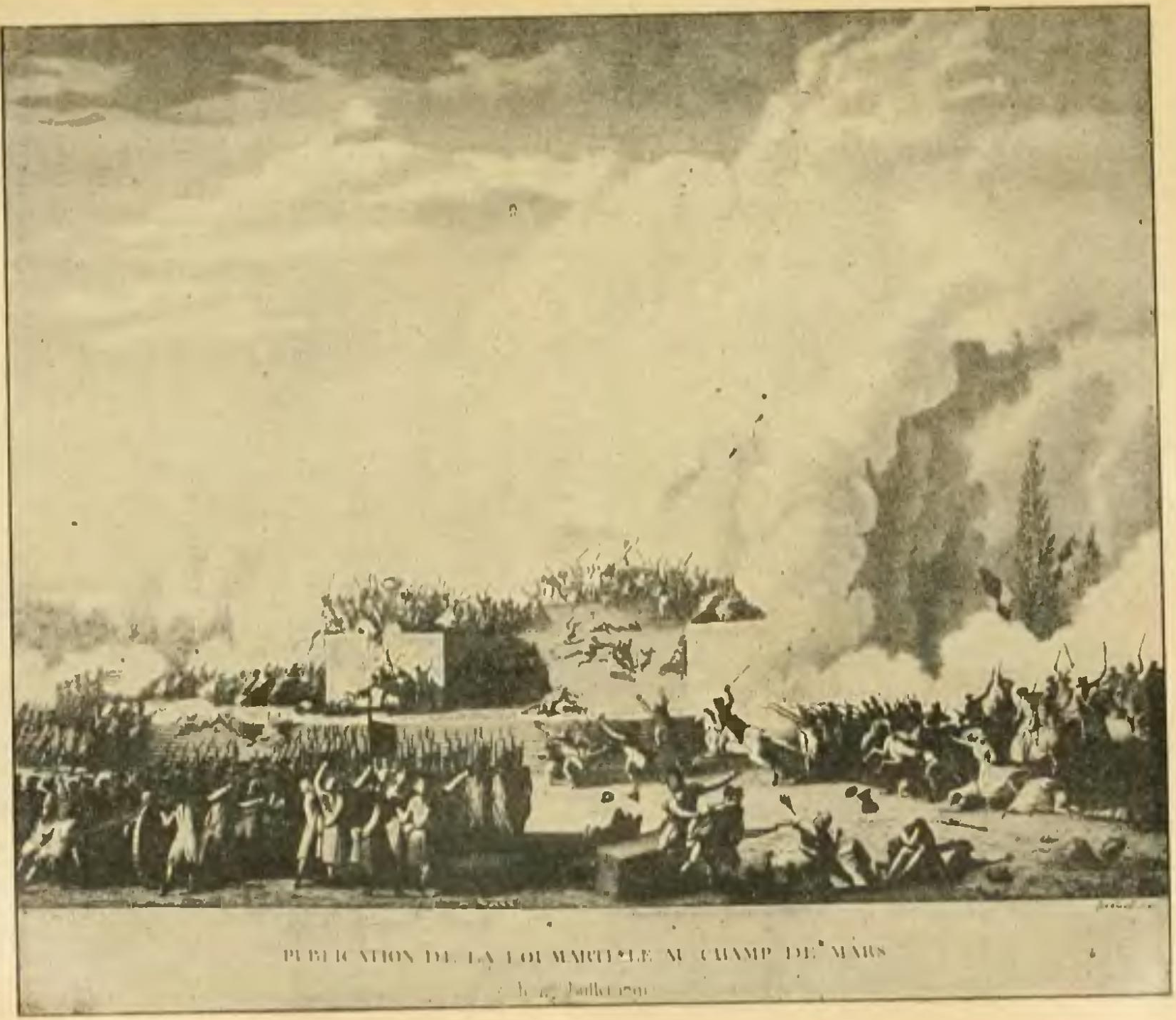 Estampe représentant le massacre du Champ de Mars dans l'Histoire socialiste de la France contemporaine (tome I).